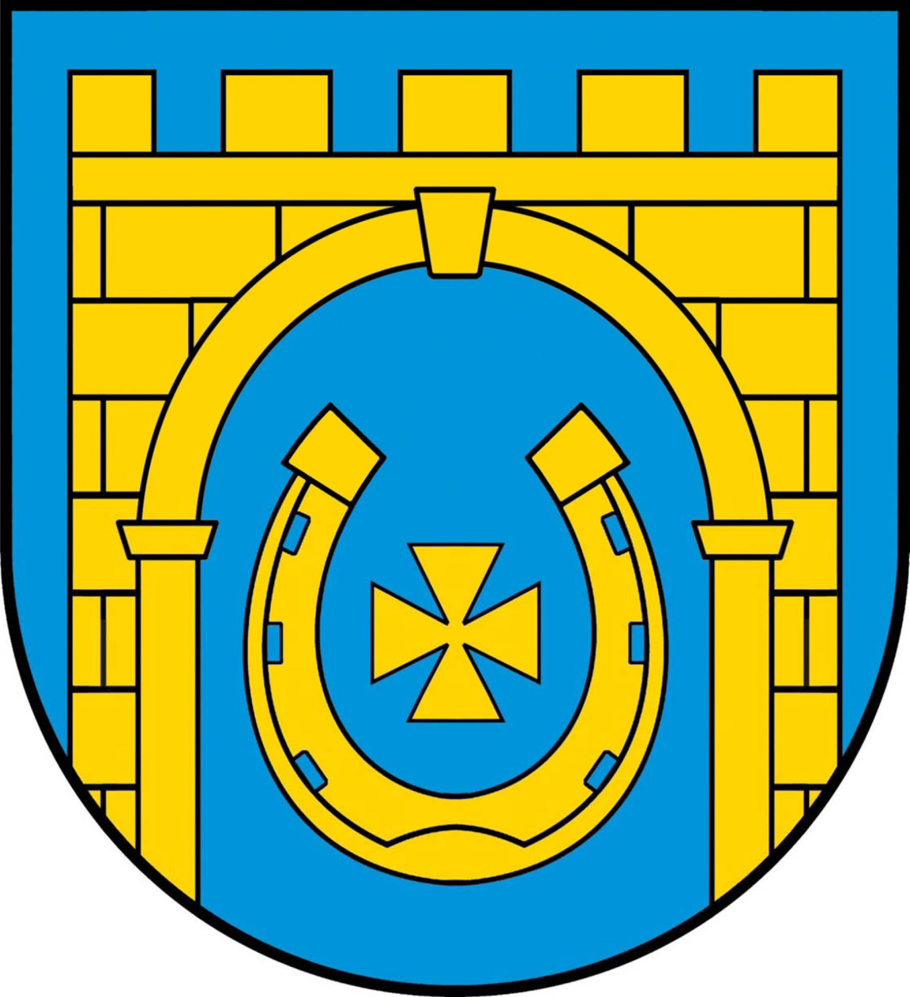 Herb gminy Lubowidz